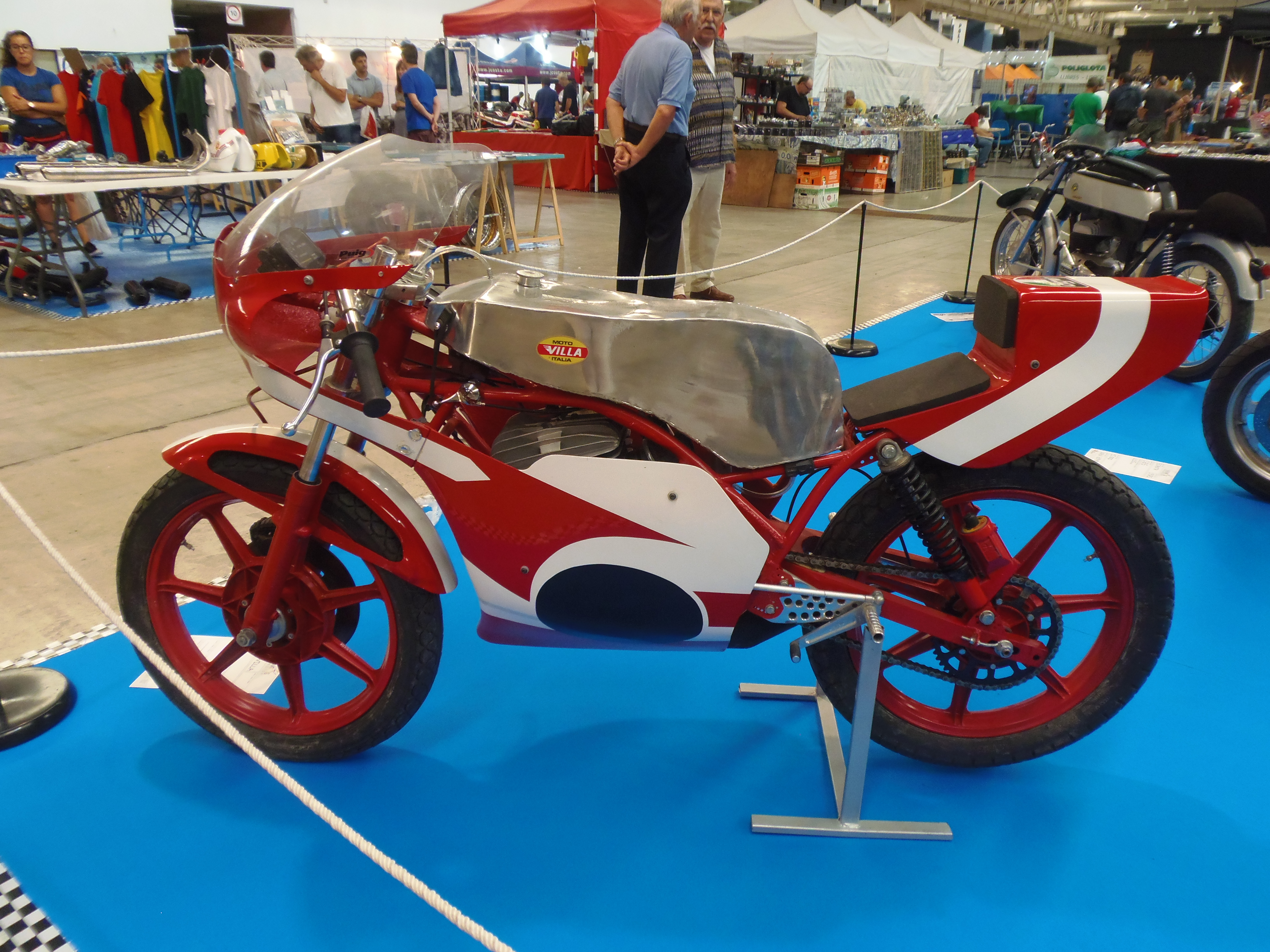 Moto Villa 125 TT4, circa 1982